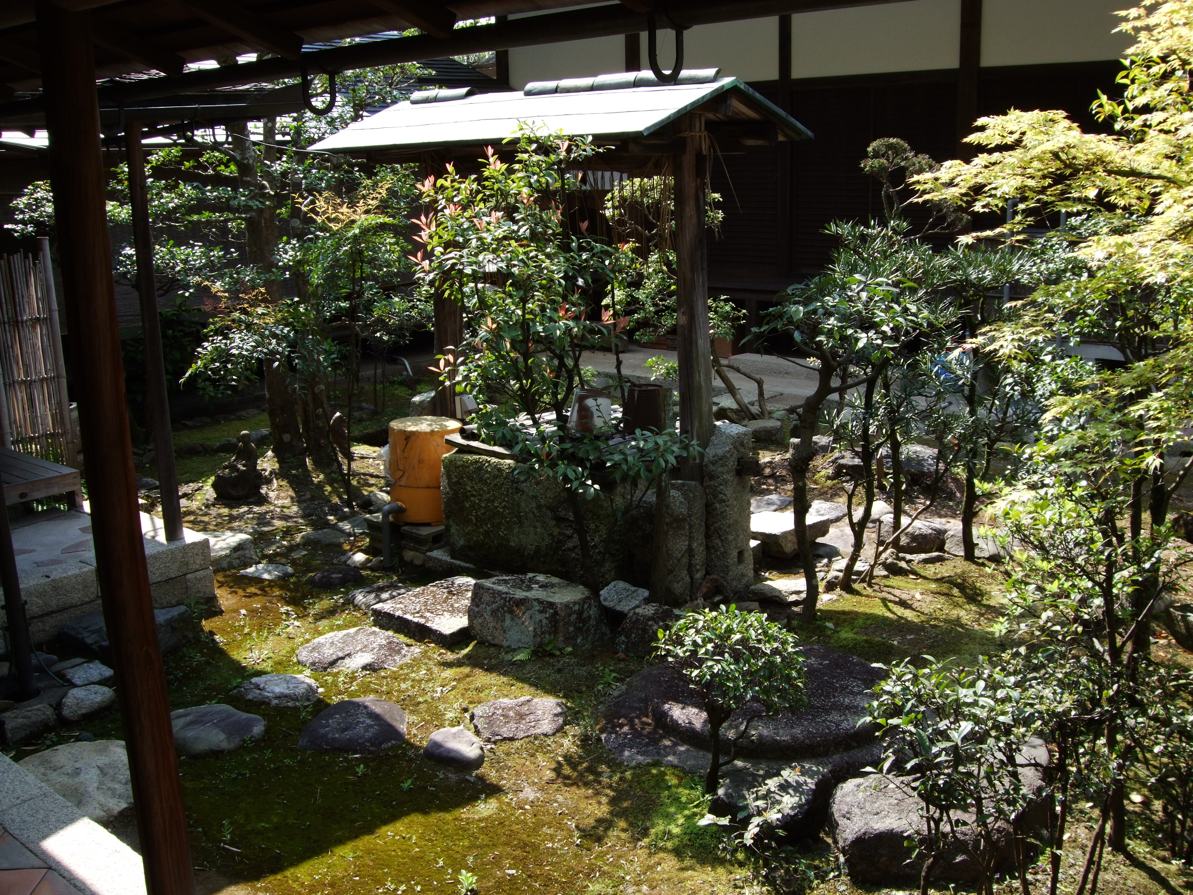 玉林院 茶室前露地